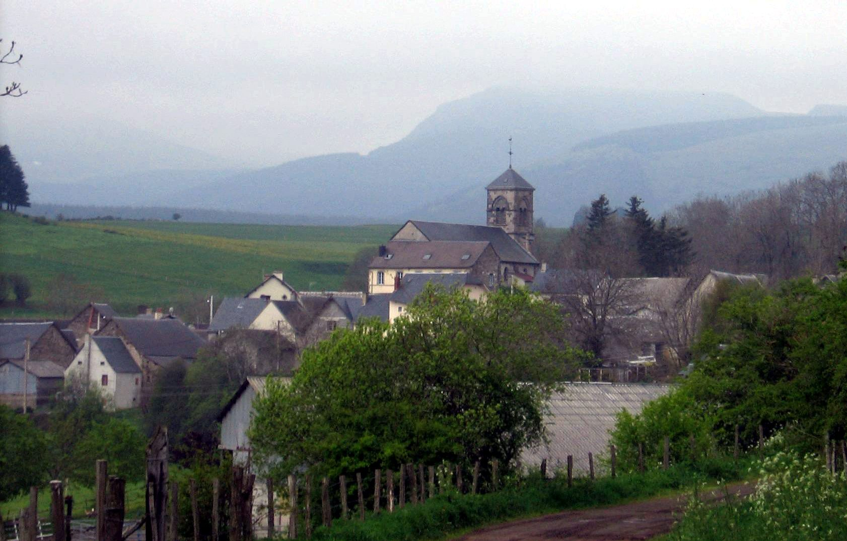 Saulzet-le-Froid, Puy-de-Dôme, France